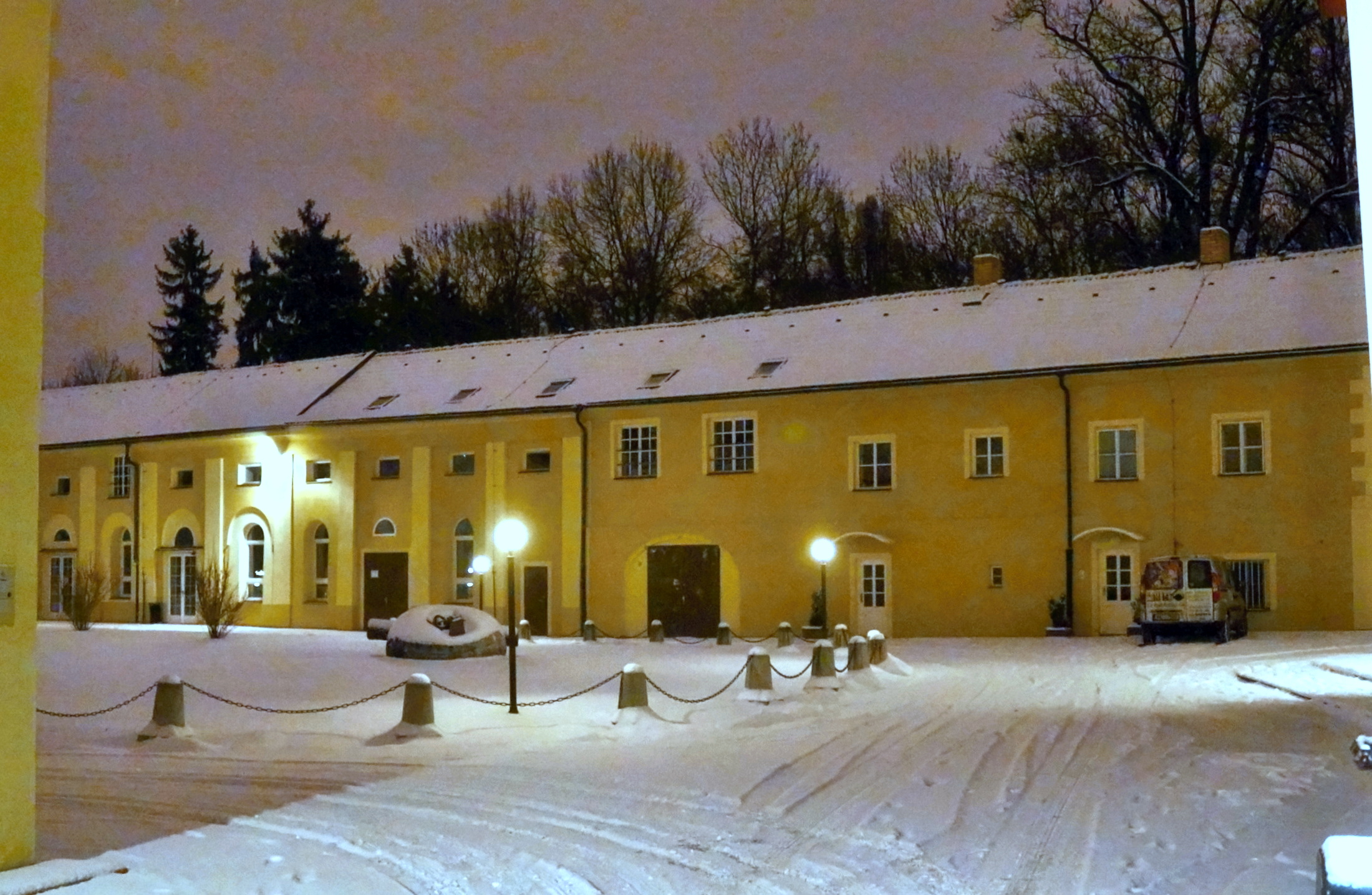 Záběhlický zámek